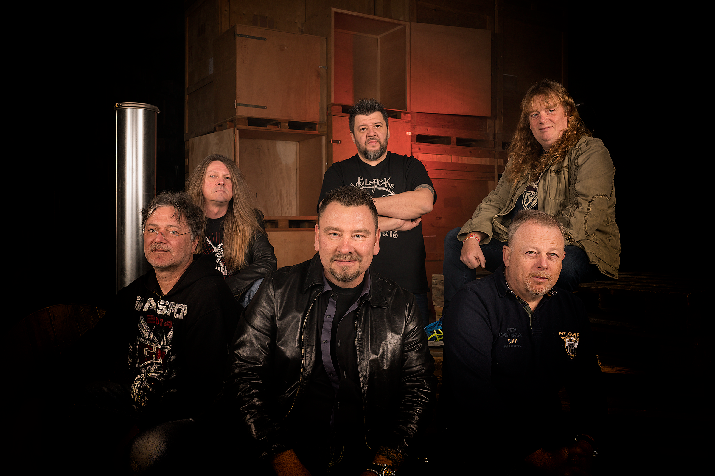 MooF 2017